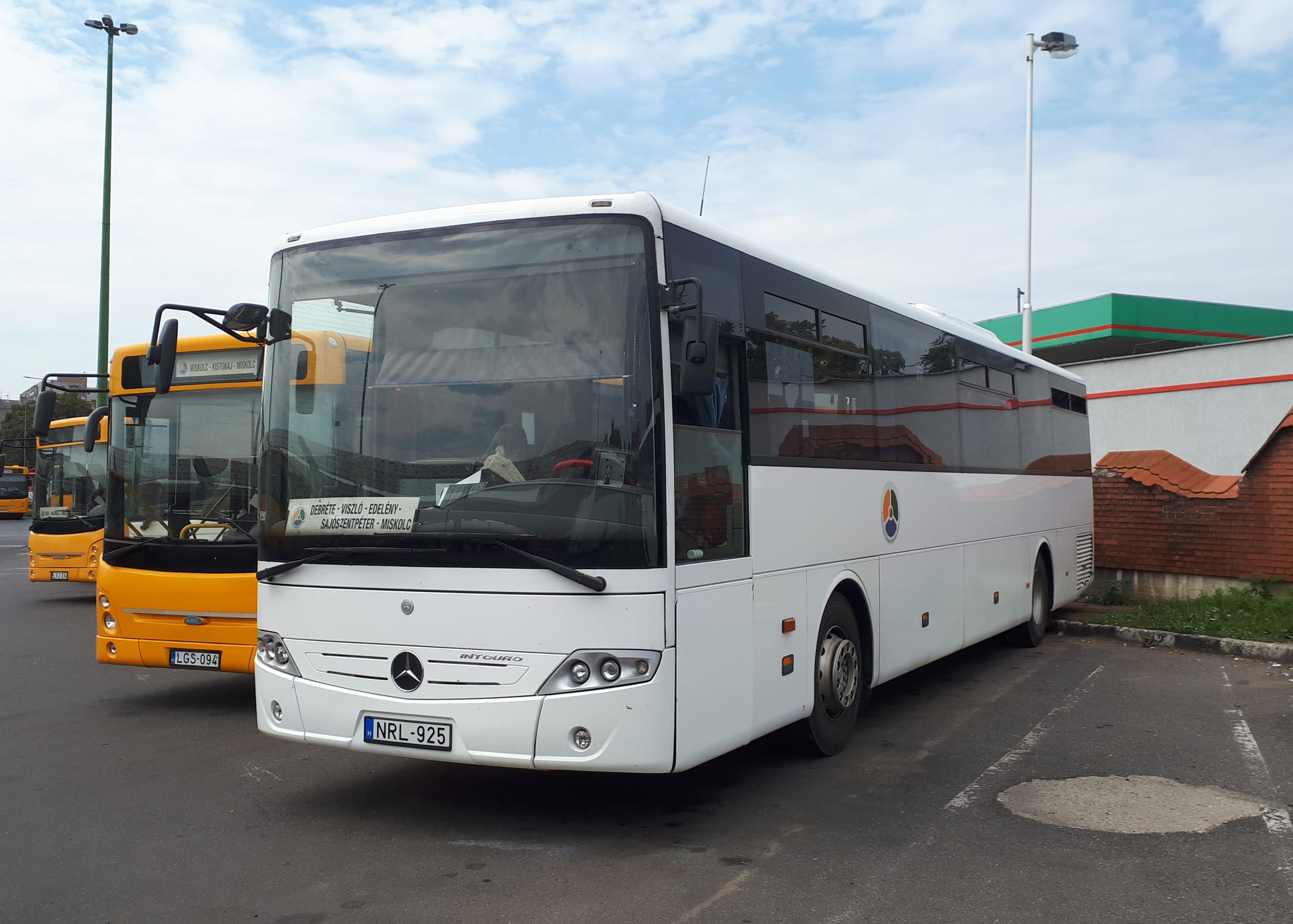 Az ÉMKK NRL-925 rendszámú Mercedes Intouro busza Miskolcon, a 3708-as helyközi járaton.